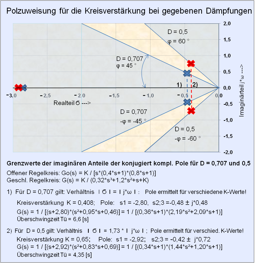 Diagramm der Polzuweisung für eingetragene Grenzen des Dämpfungsgrades